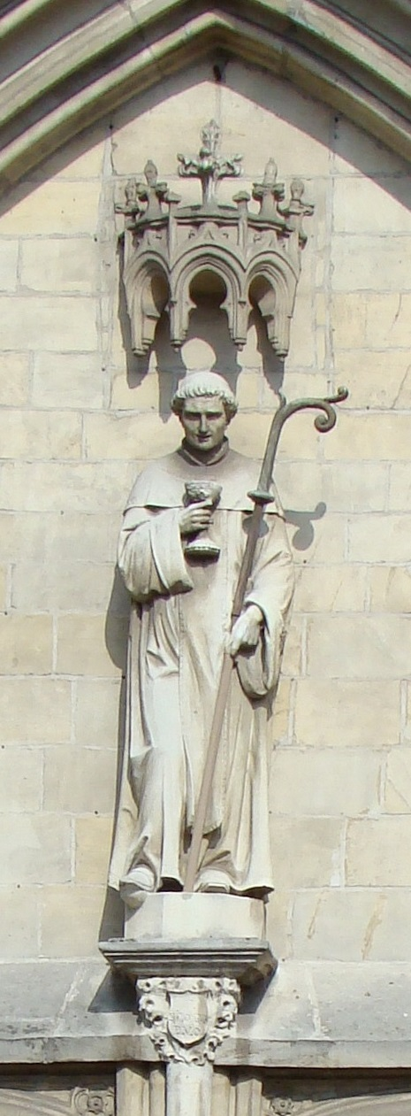 Portalstatue des hl. Tillmann, Sint-Tillo-Kerk, Isegem